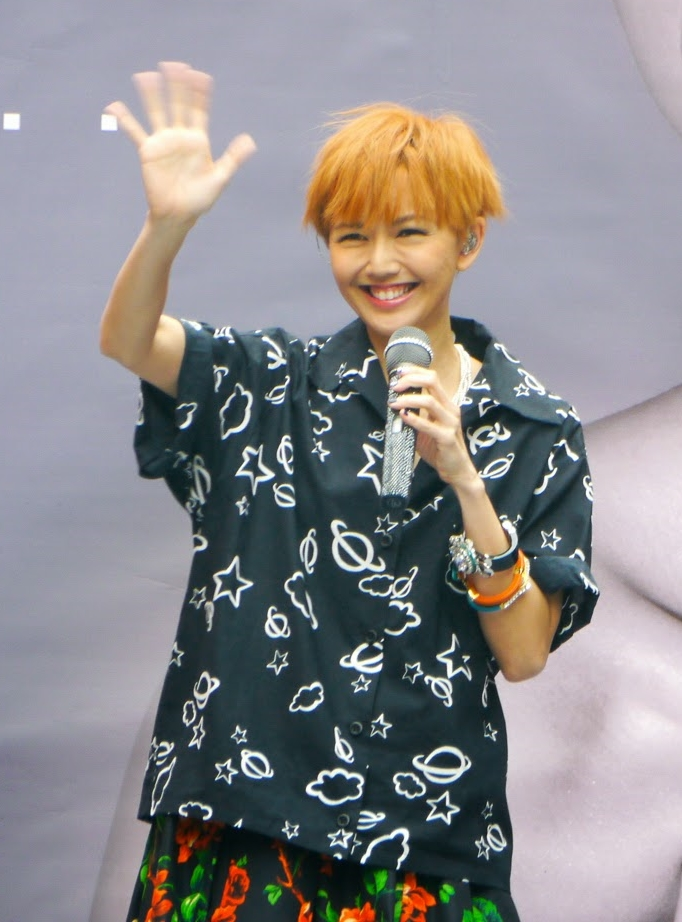 孫燕姿《克卜勒》台北簽唱會Stefanie Sun《Kepler》Fan Meet